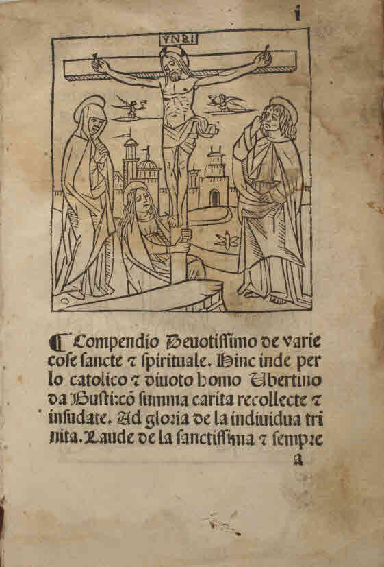 Compendio devotissimo de varie cose sancte e spirituale. - [Milano] : [Giovanni Antonio d'Onate], [1483?]. - 168 c. ; a-b⁴, c-y⁸ ; 8°. - Errori nella cartulazione romana a stampa .